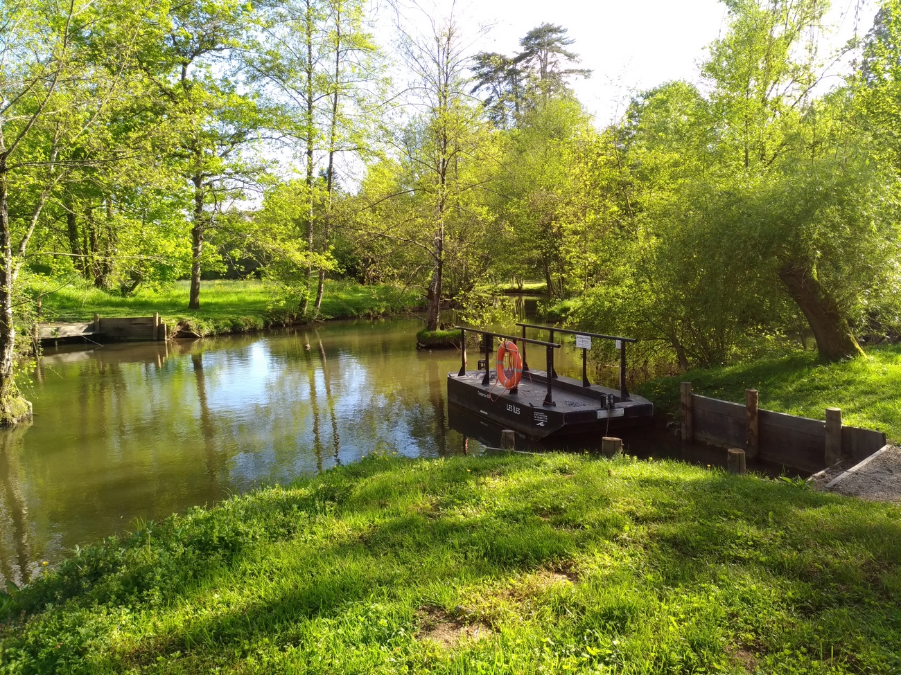 Bac à chaîne permettant de traverser la Mère au niveau du Château de la Recepte.